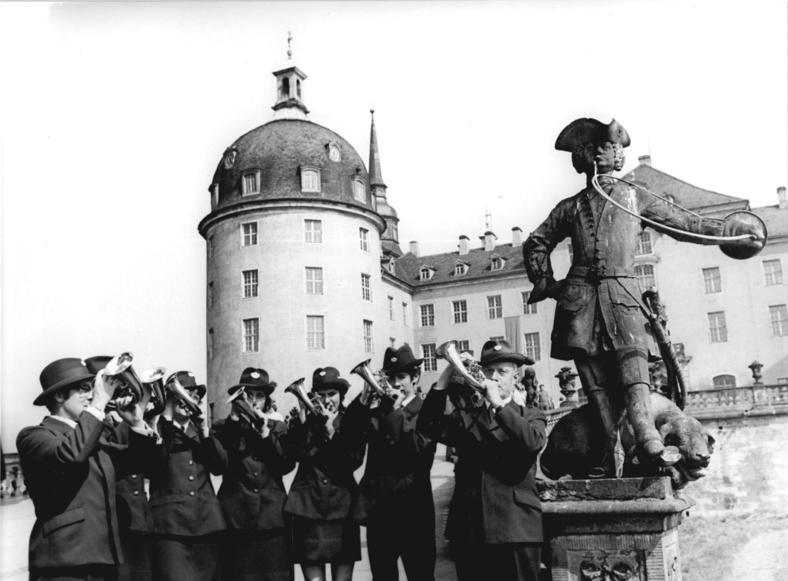 Lommatzsch, Kulturtage, Jagdhornbläser ADN-ZB Häßler 19.6.76 Dresden: Kulturfesttage- Die 5. Kulturfesttage der sozialistischen Landwirtschaft der DDR wurden am 18.6.76 in Lammatzsch (Kreis Meißen) eröffnet. Vor der Moritzburg gab am 19.6.76 ein stimmungsvolles Jagdhornblasen den Auftakt für einen Tag des Forstarbeiters.